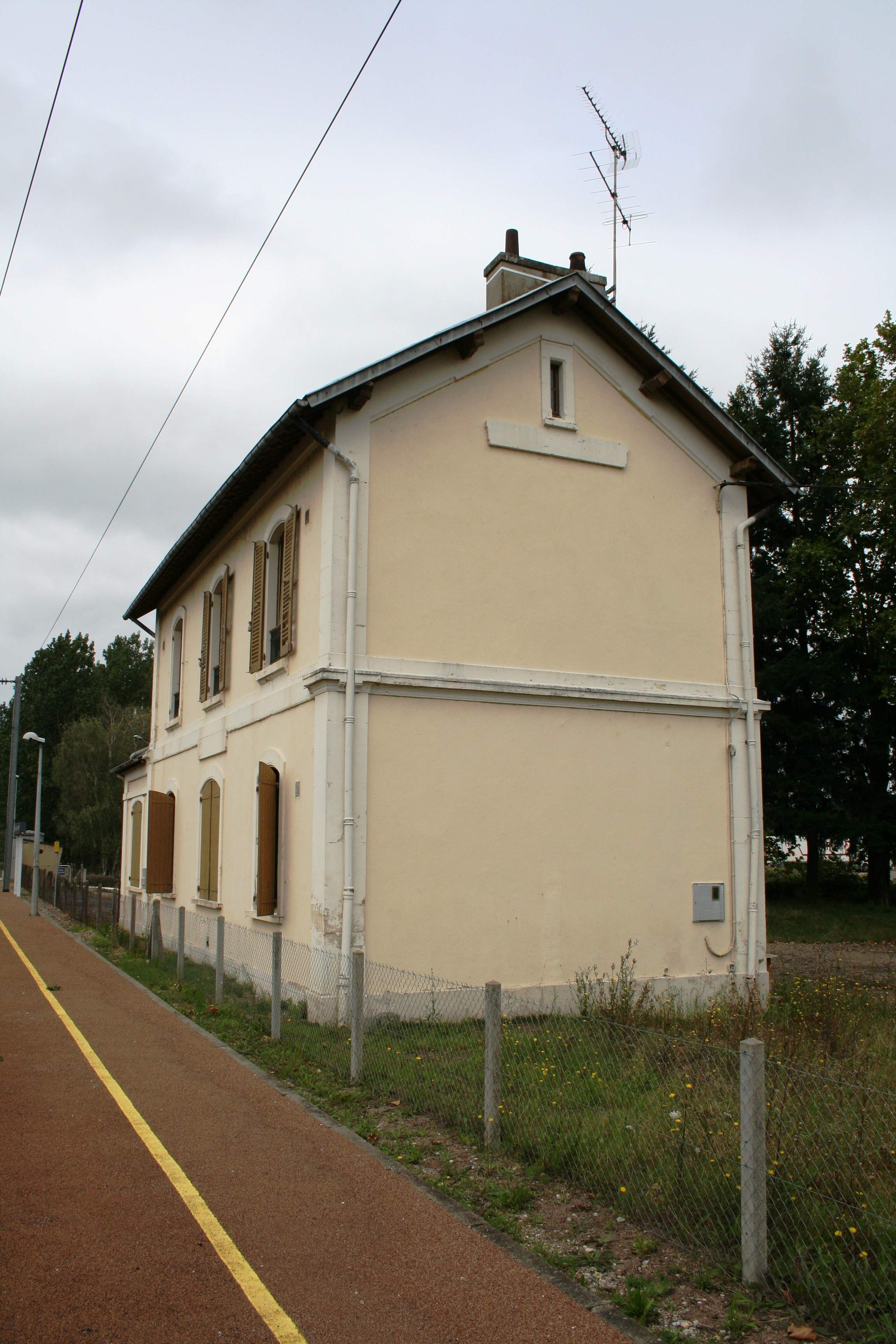 Gare de Chantenay-St Imbert